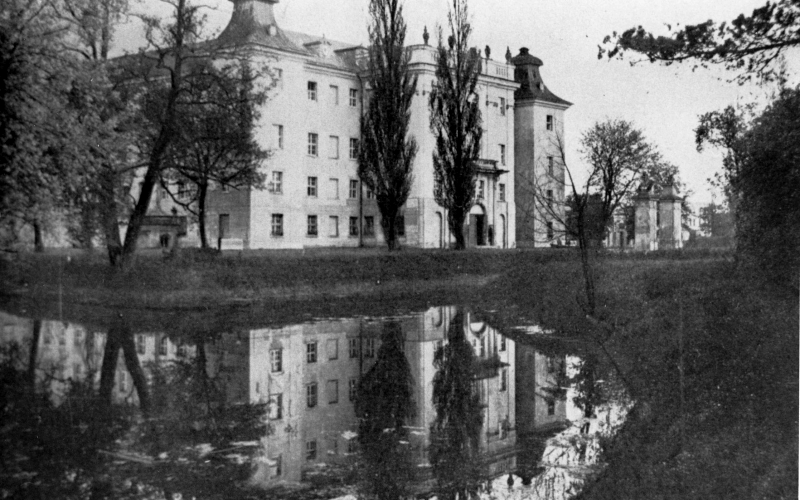 Rydzyna castle in 1938 seen from north east, from B. C. Biega collection. Zamek w Rydzynie, widok z płn. wschodu w 1938, ze zbioru B. C. Biega